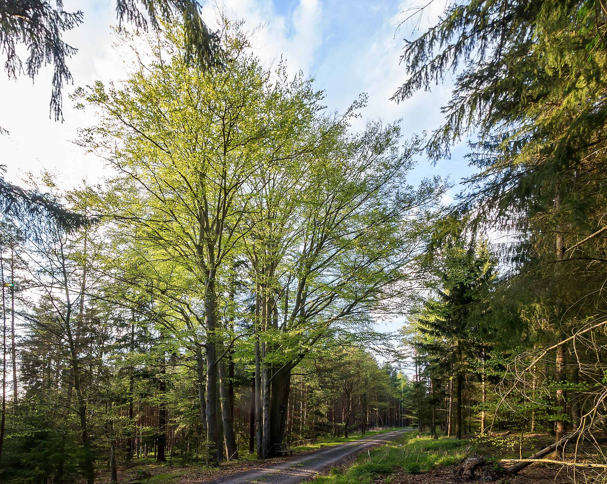 Acht-Buchen Listen Nr. 25 Zeutsch VI